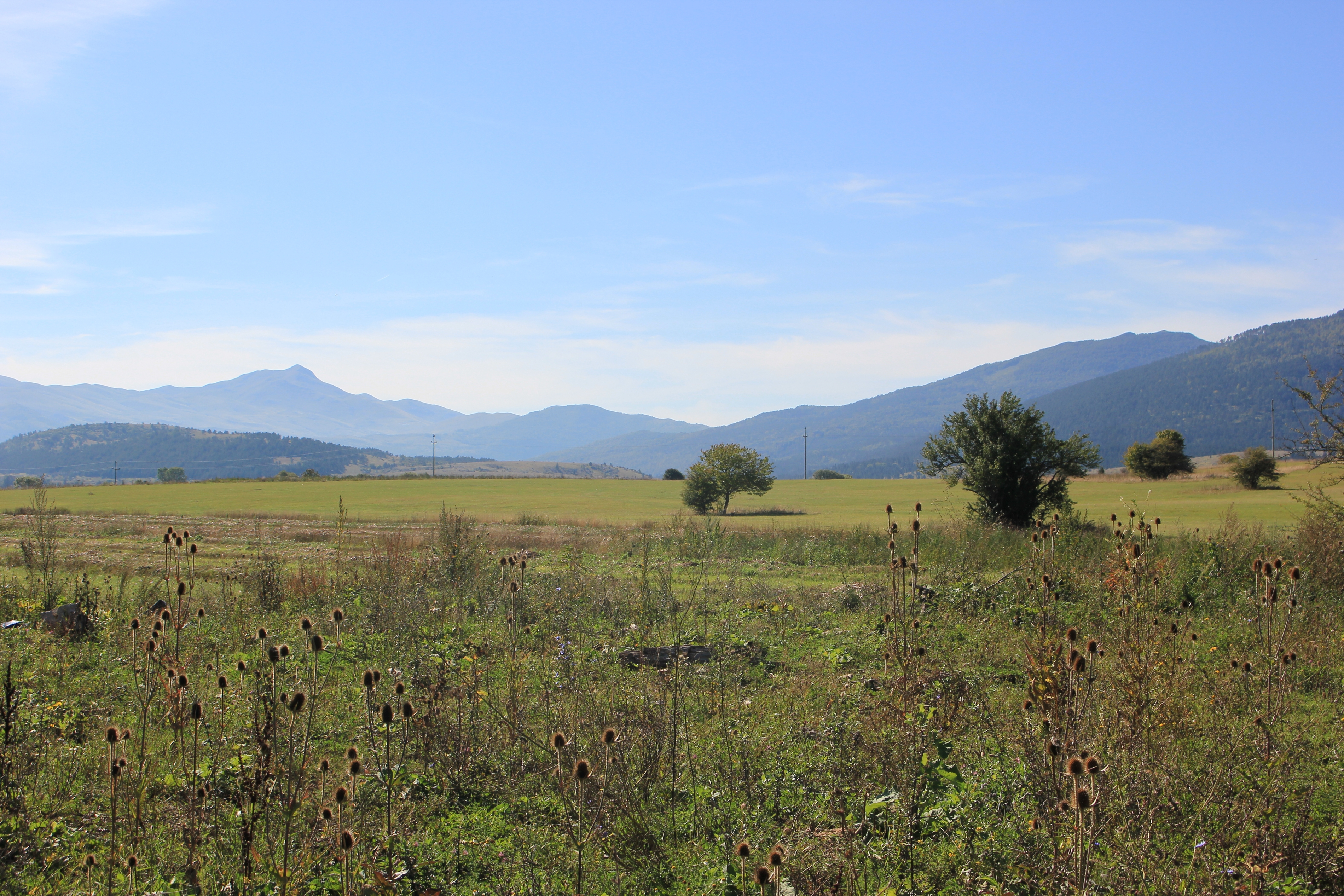 Im Grahovsko polje bei Bosansko Grahovo, Bosnien.